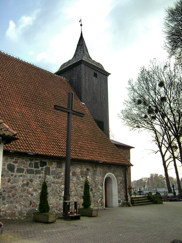 Kościół parafialny pw. św. Michała Archanioła w Gdyni Oksywie